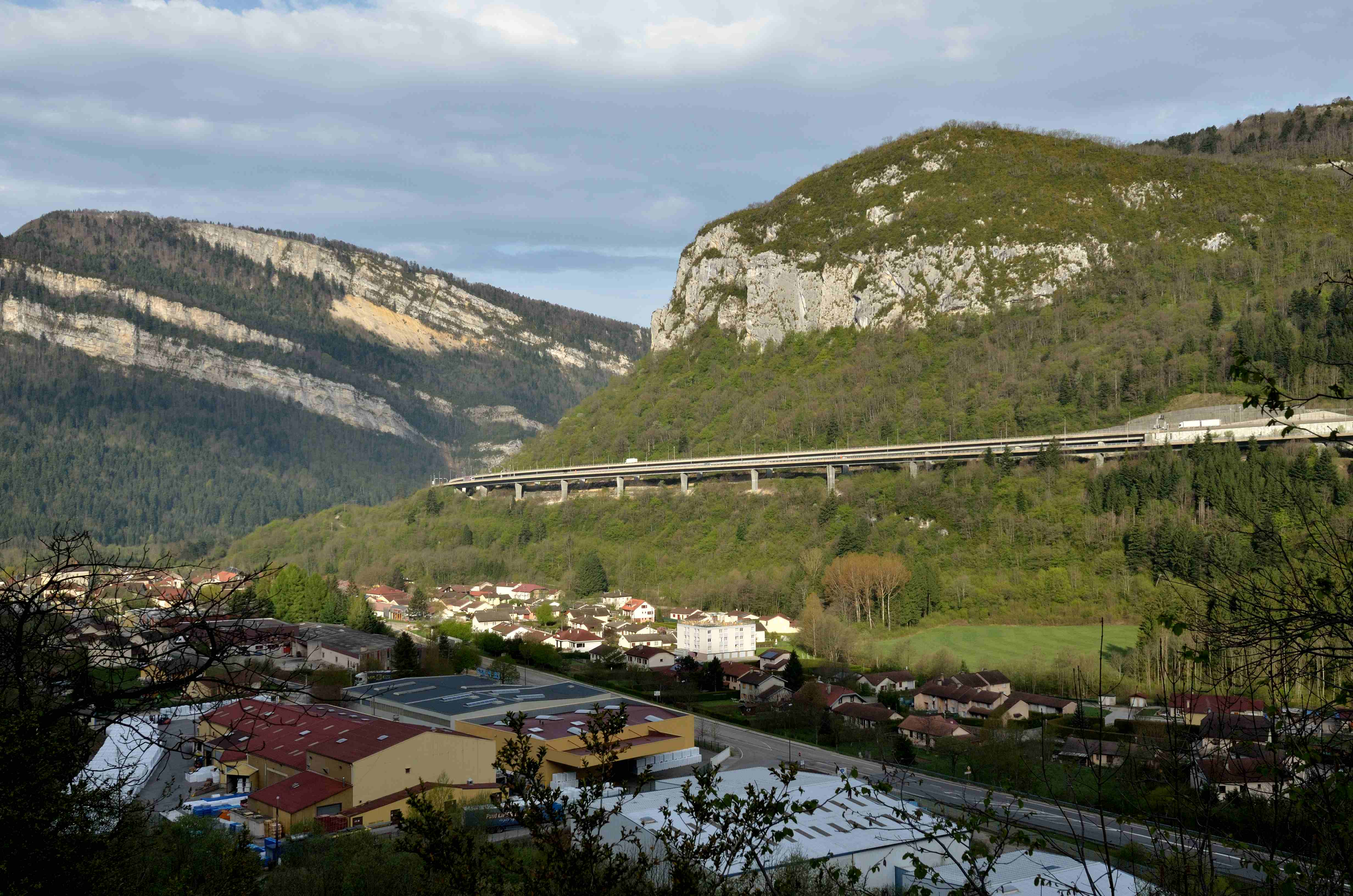 Viaduc des Neyrolles sur l'autoroute A40